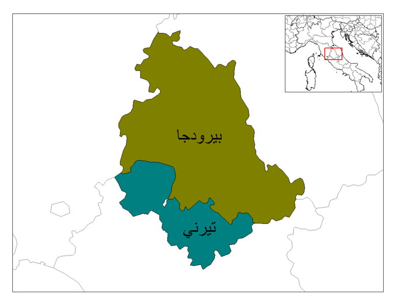 خريطة إقليم أومبريا بالعربية